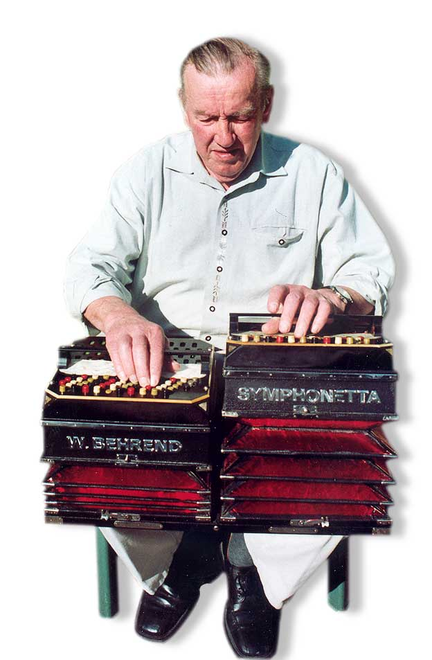 W.Behrend